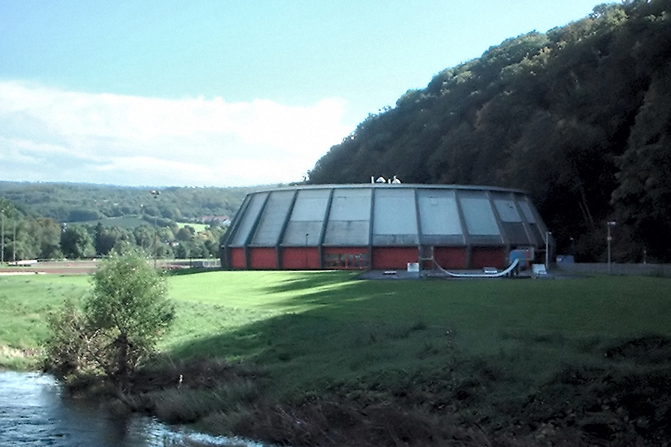 Rundturnhalle